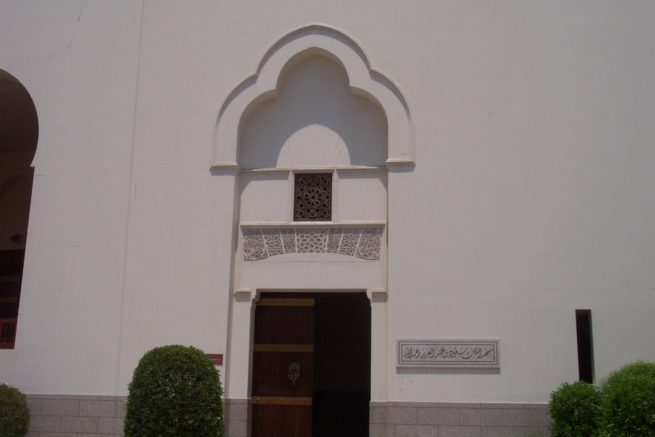 الباب الجنوبي للمسجد-في وضع الواجهة -- The Southern gate of the mosque-Elevation